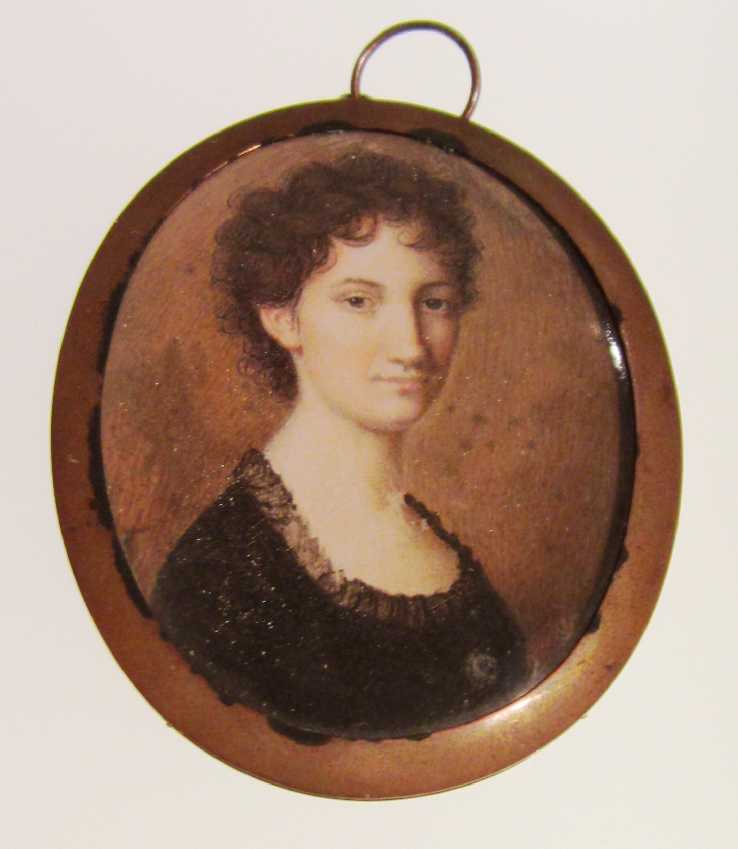 Wilhelmine von Zenge (1780-1852)